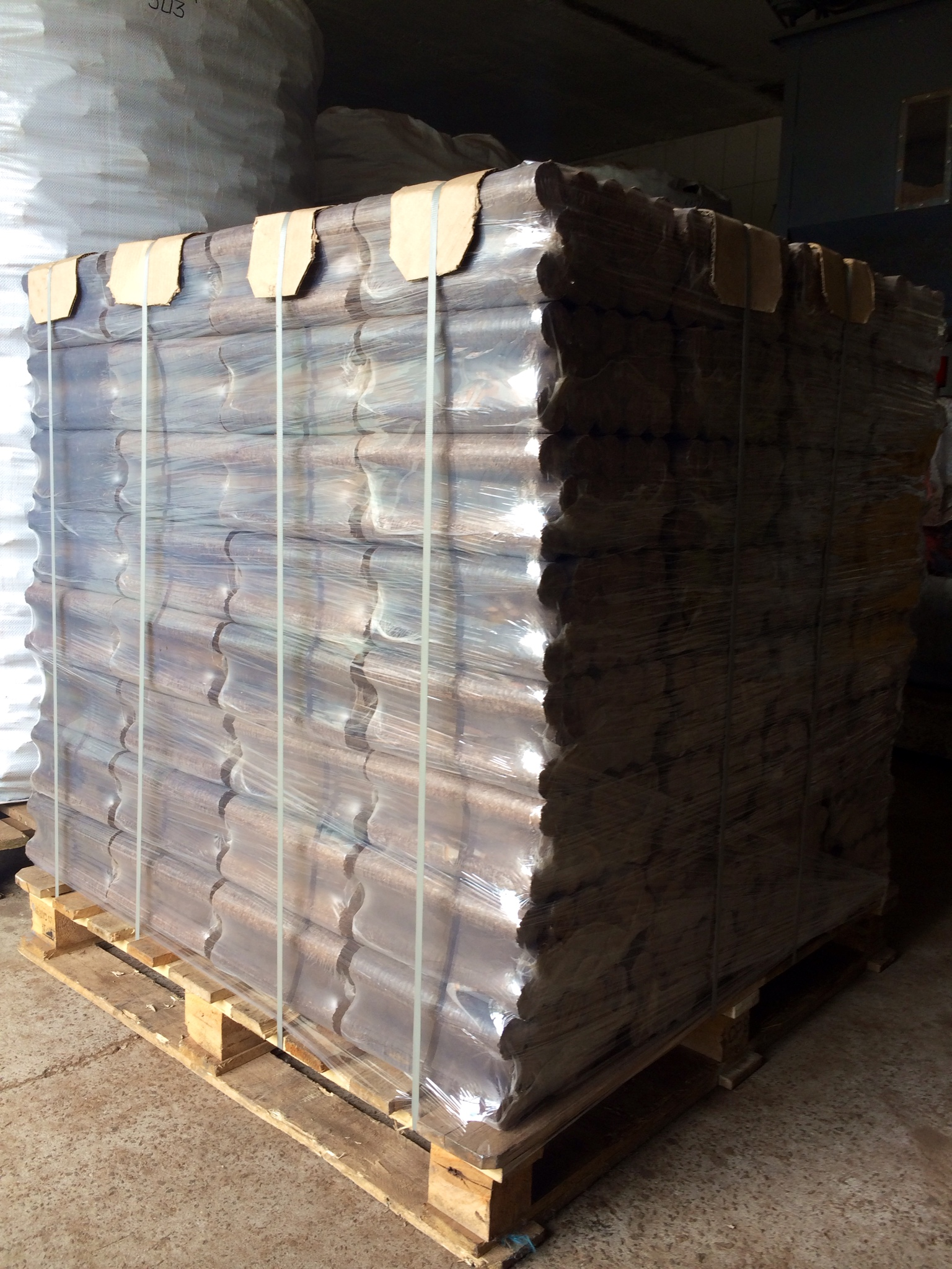 Паливні брикети з деревини від ТМ Зелений Шлях